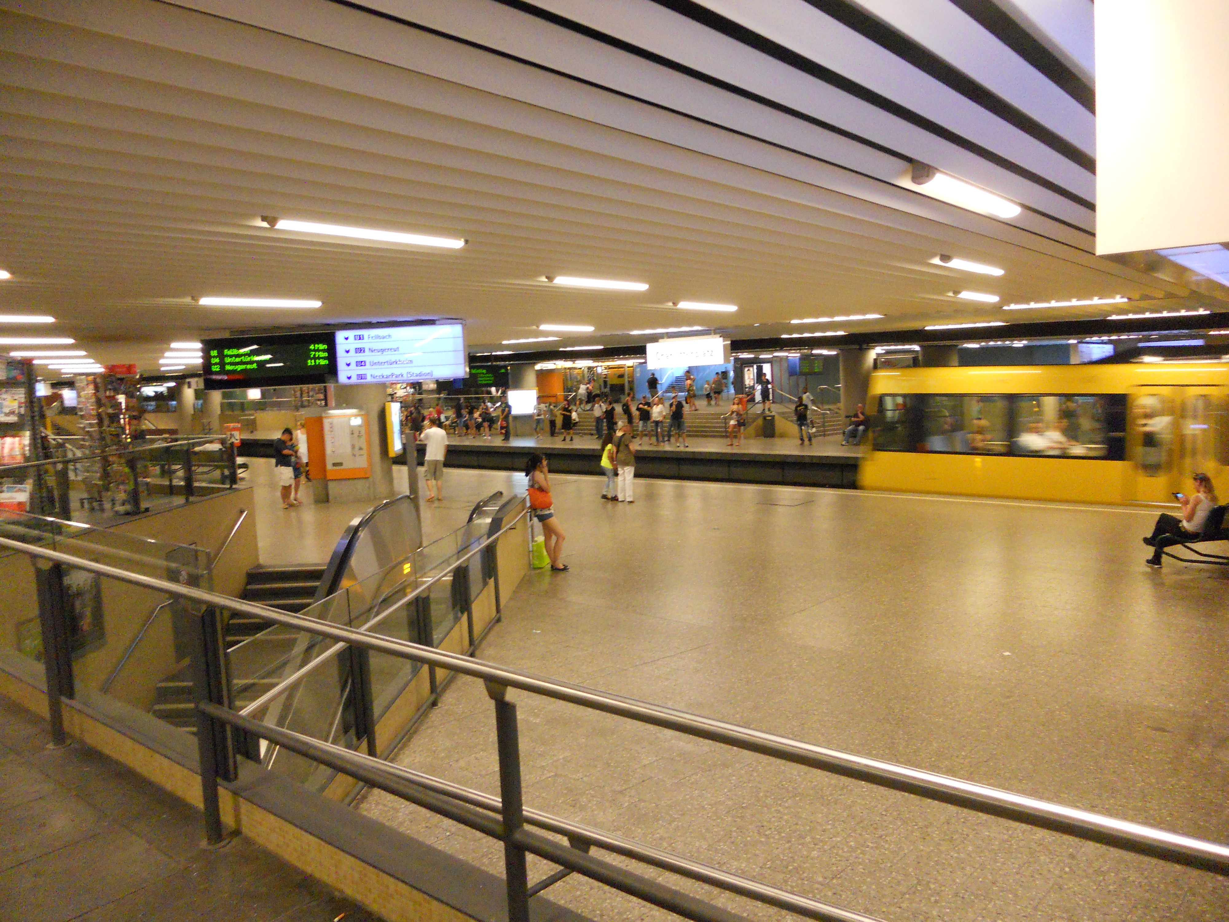 Stadtbahnknoten Charlottenplatz in Stuttgart, obere Ebene.